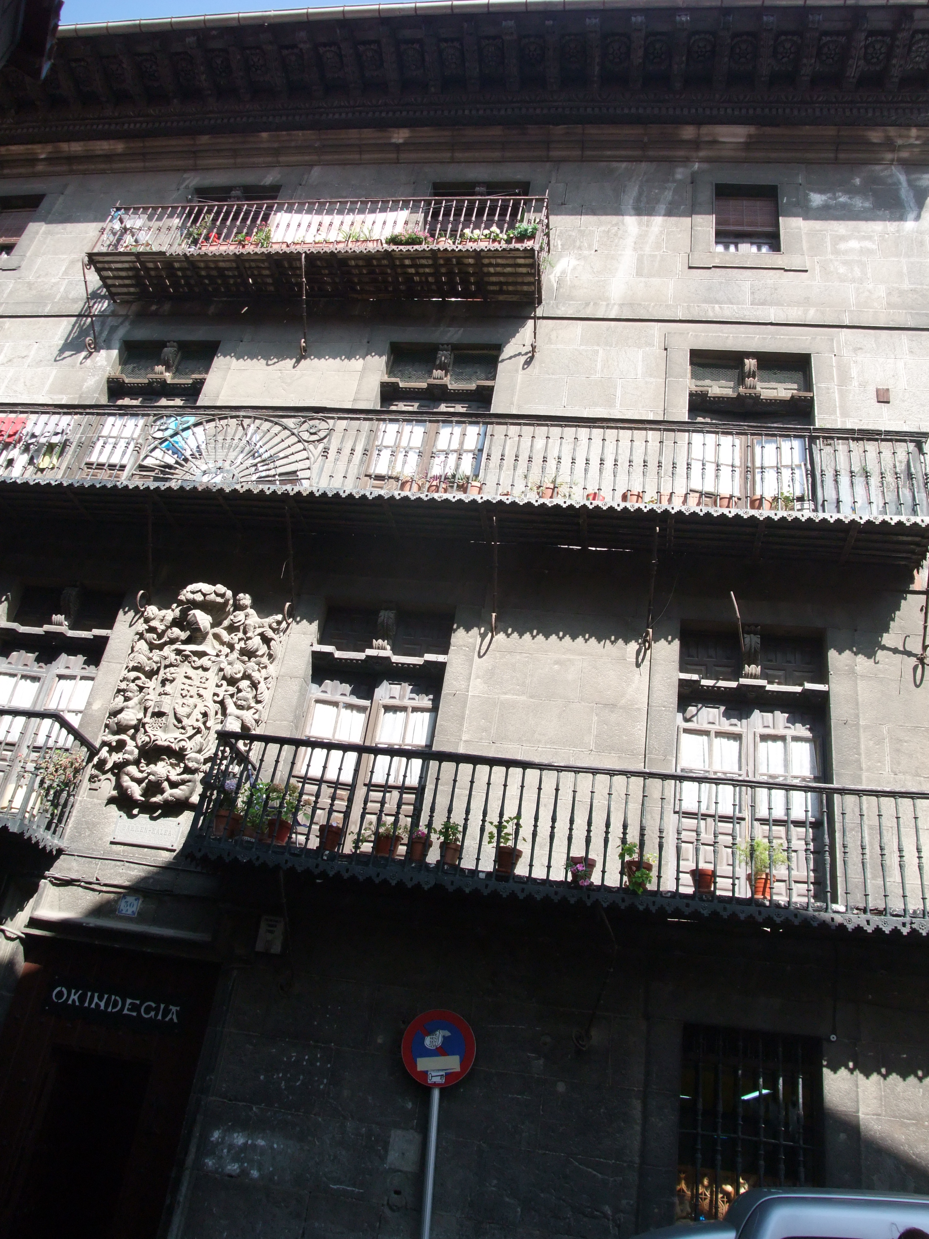 Mutriku (Guipúzcoa)-Palacio Olazarra-Mizquia-1